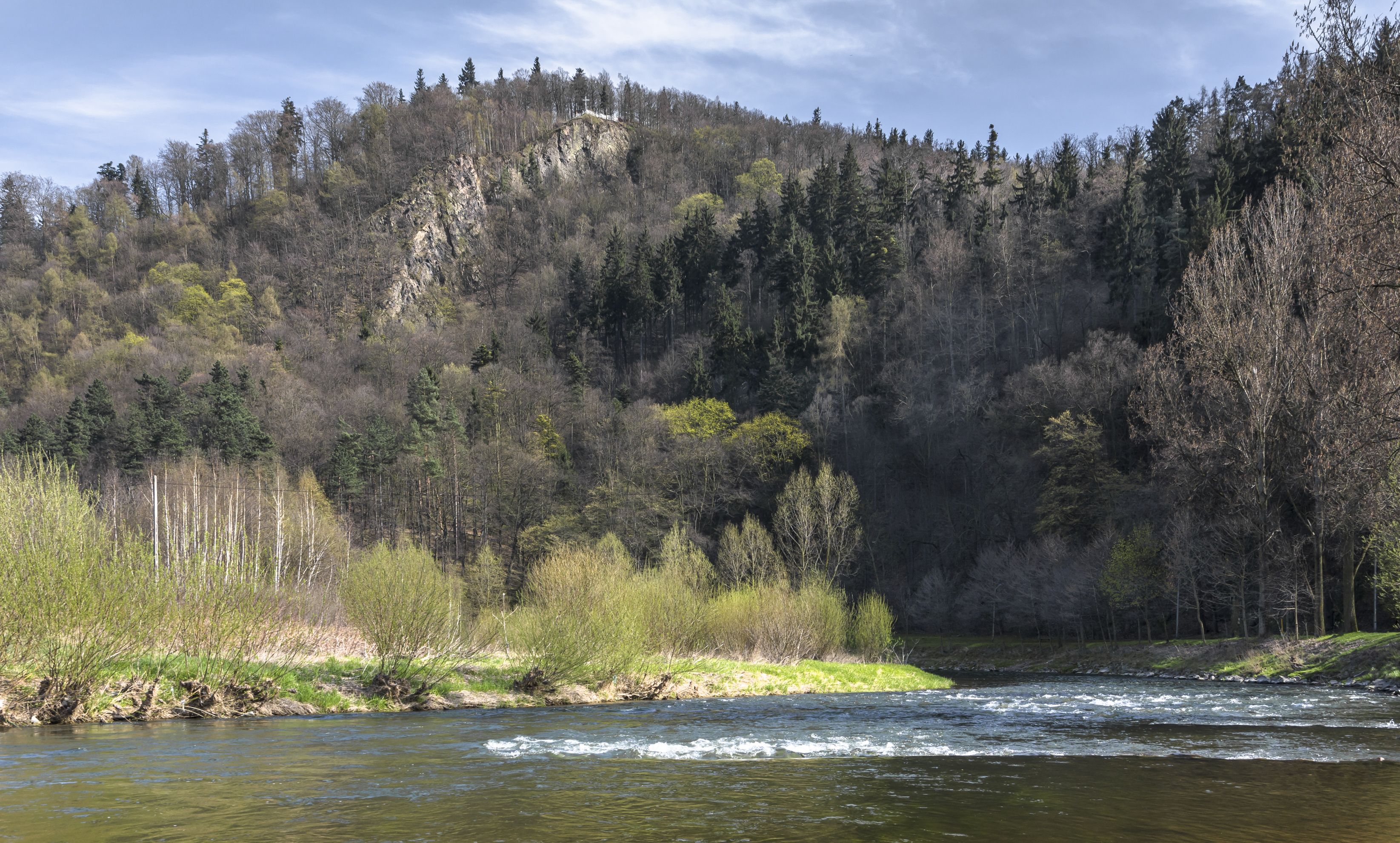 Zespół przyrodniczo-krajobrazowy Obryw skalny.